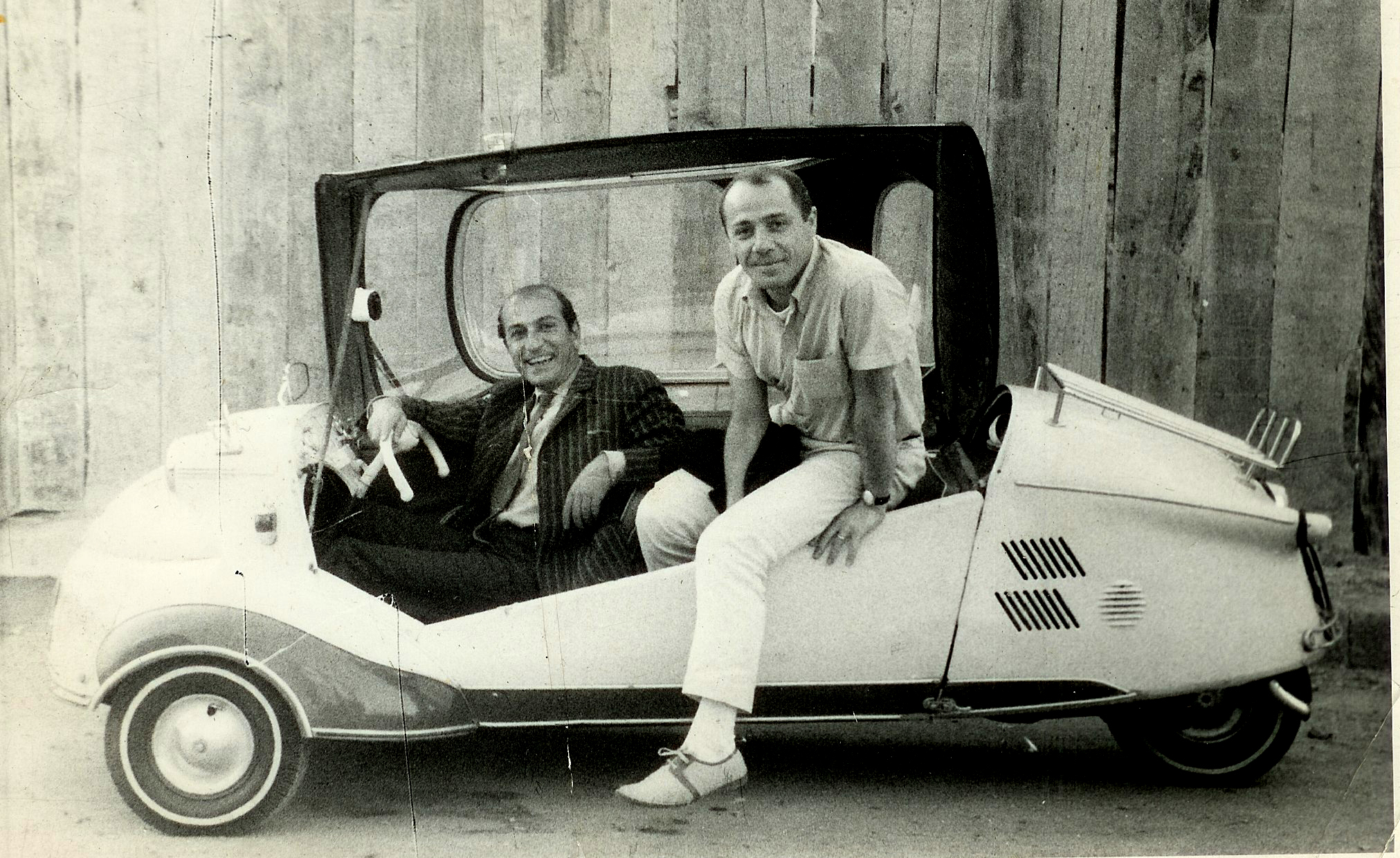 Yılmaz Onay (solda), Erol Keskin'le Messerschmitt arabasında